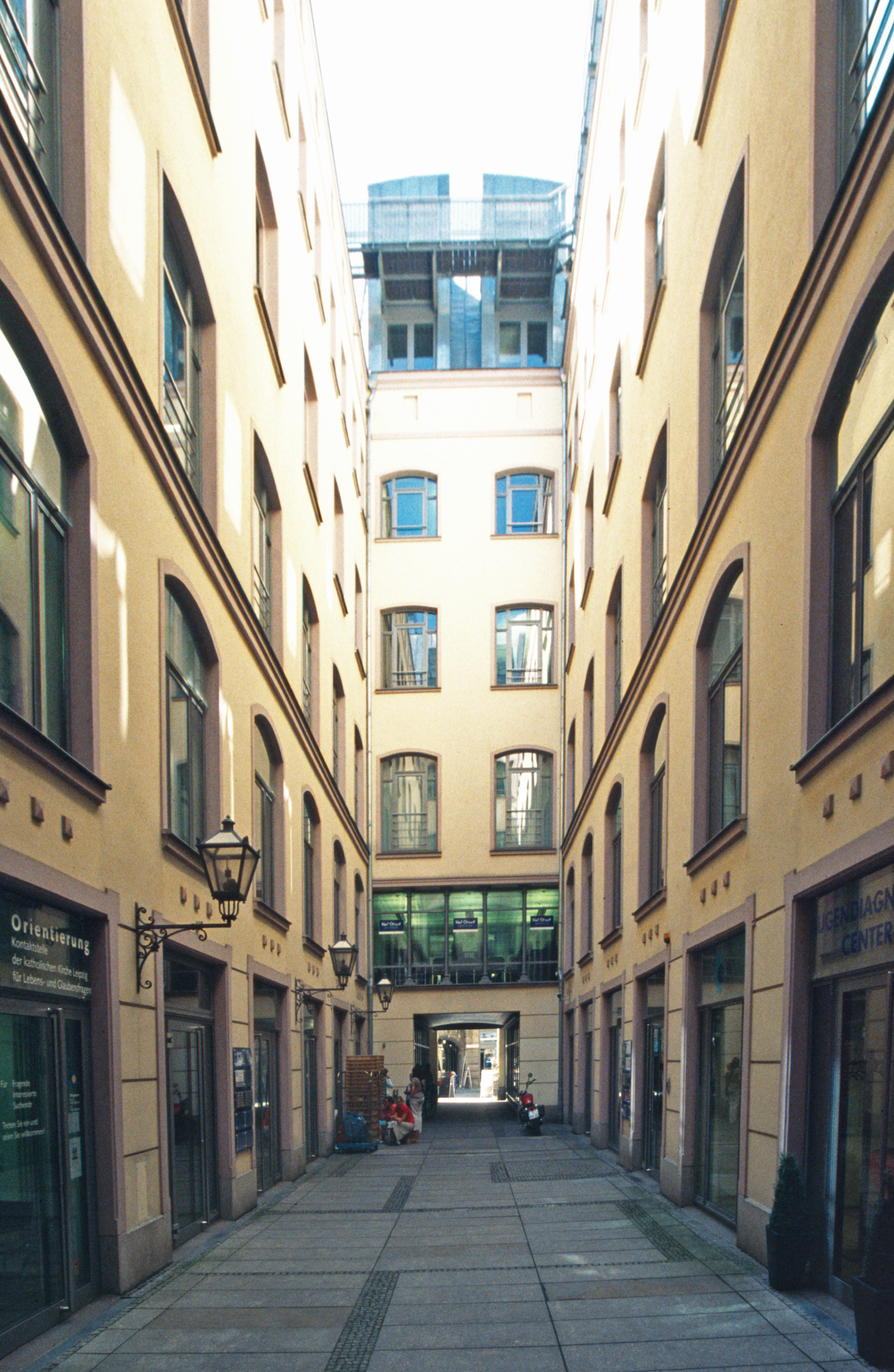 Durchgang "Blauer und Goldener Stern" in Leipzig, Blickrichtung West. Der passagenartige Durchgang führt von Kretschmanns Hof in der Katharinenstraße 17 durch diesen Hof in die Hainstraße 14.